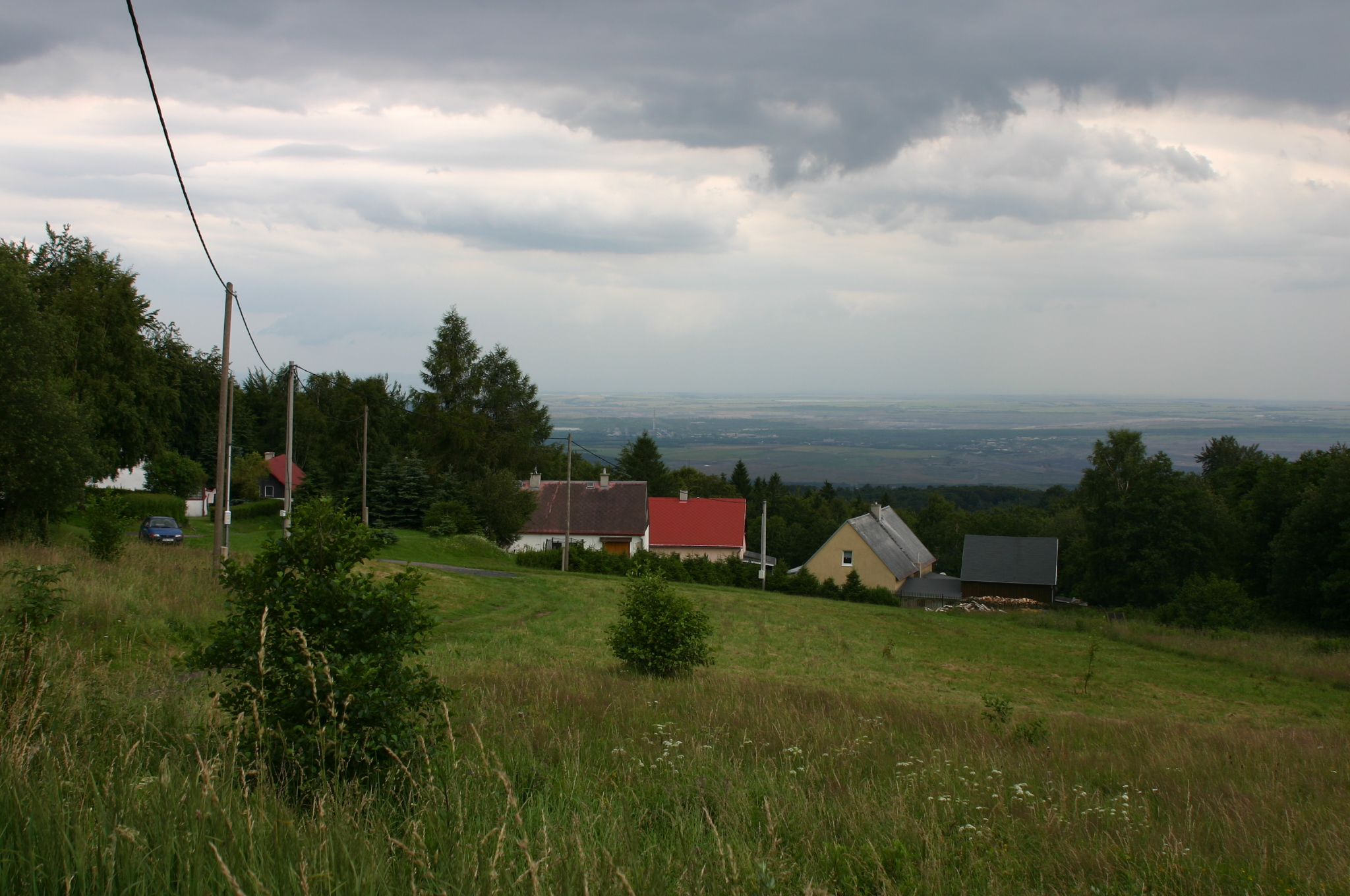 Ortsschaft Zettel (Sedlo) bei Göhren (Klíny) im Bezirk Brüx (Most)